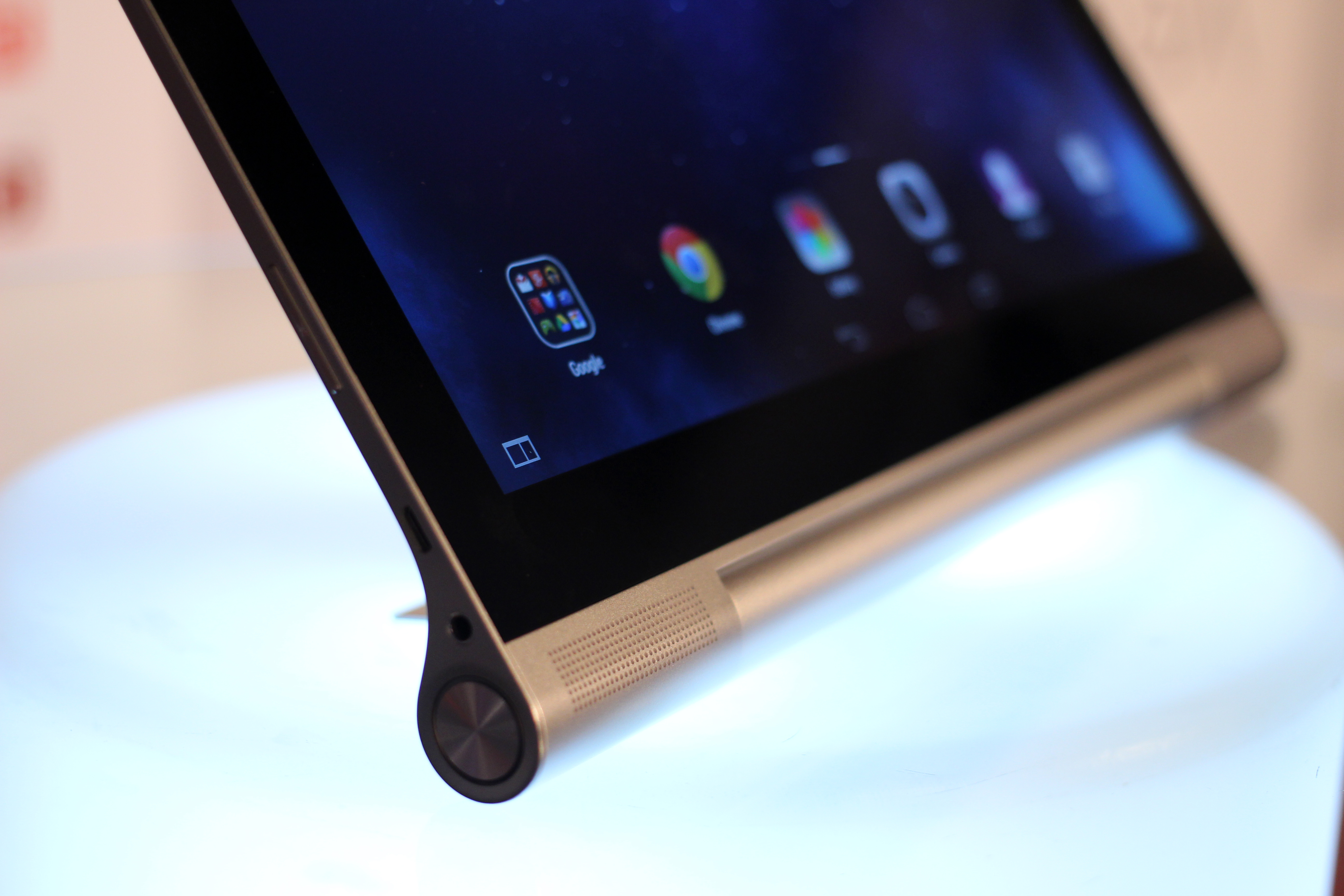 Lenovo YOGA 2 Tablet Pro